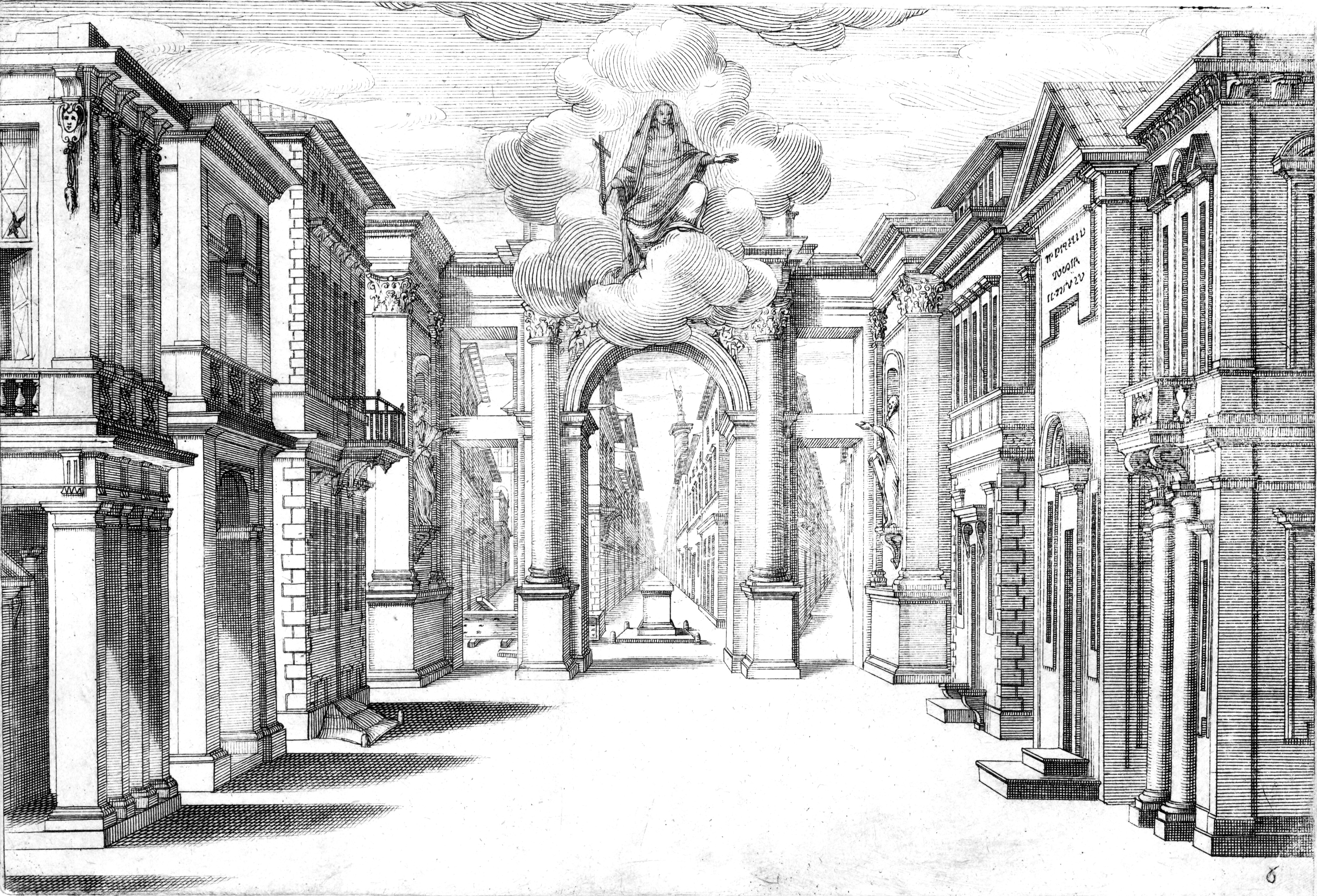 Stefano Landi - Il Sant'Alessio - Rome 1634 - Plate 6 without proscenium